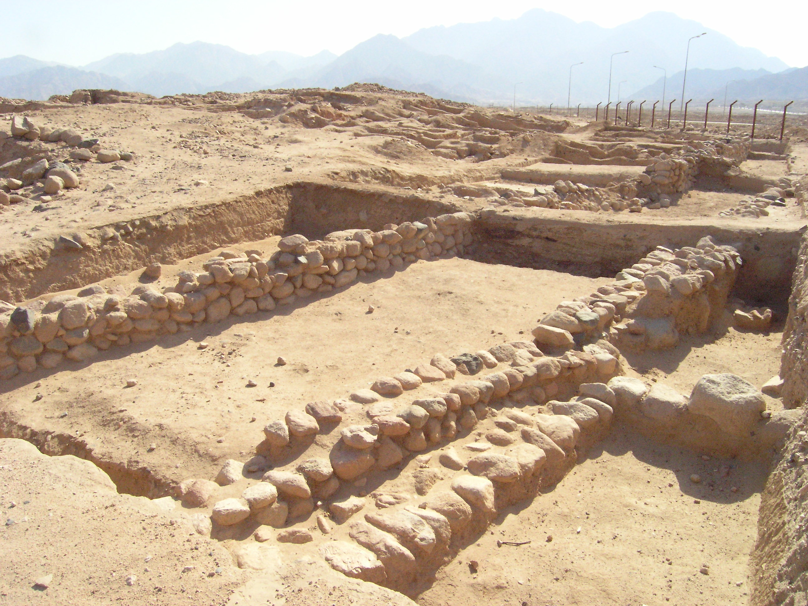 Ausgrabungen auf dem Tall Hujayrat al-Ghuzlan, Jordanien; Befestigungsmauern im Süden